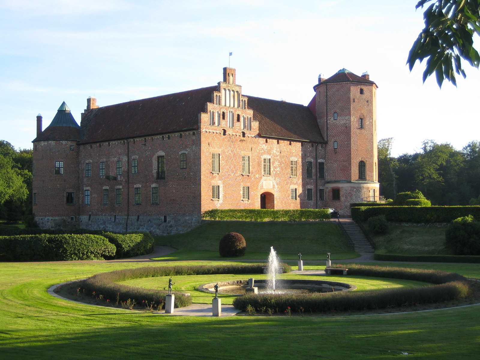 Torups slott. Bilden tagen av mig själv 18 augusti 2005.